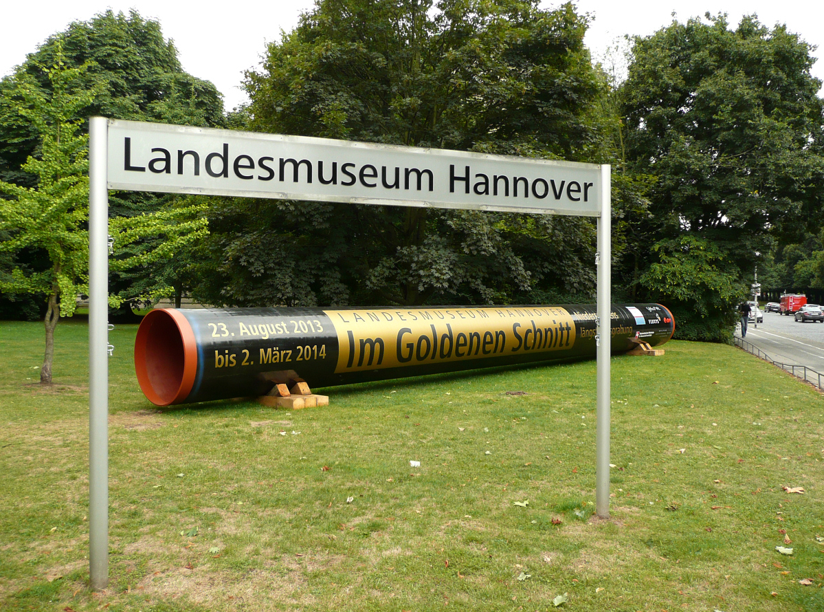 Niedersächsisches Landesmuseum, Pipelinestück neben Museum für Ausstellung im goldenen Schnitt